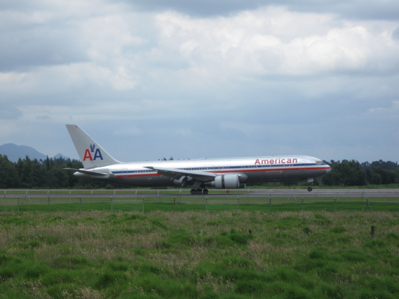 Boeing 767-300 de American Airlines aterrizando en el Aeropuerto Internacional El Dorado de Bogotá, Colombia.